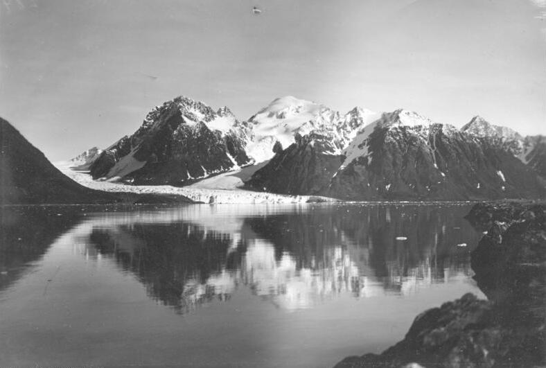 Polarfahrt mit dem Dampfer "München".- Imposante Bergformationen bei der Einfahrt im Hafen von Möller-Bay 17. Juli - 12. August 1925